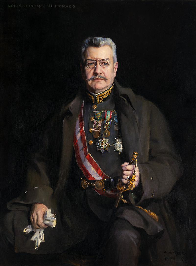 Le prince Louis II (1870-1949) en uniforme de général de l'armée française. Détail d'une oeuvre de Philip Laszlo de Lombos, 1928.